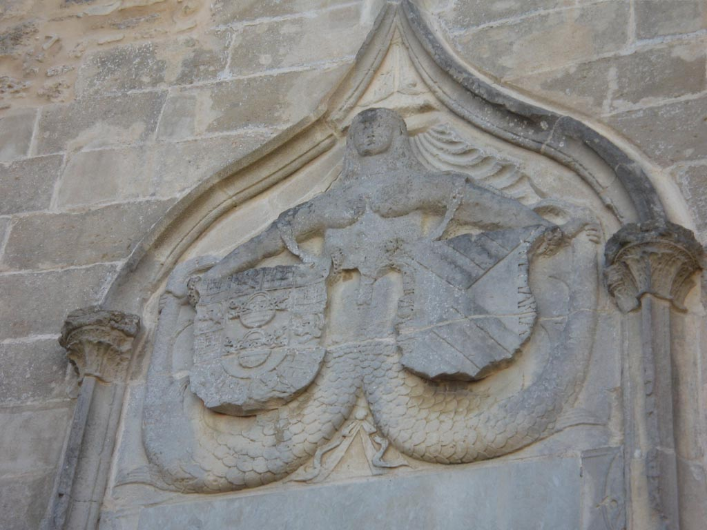 Relieve gótico de tritón o sirena con los escudos de los Pérez de Guzmán y los Hurtado de Mendoza. Castillo de Santiago, en Sanlúcar de Barrameda.